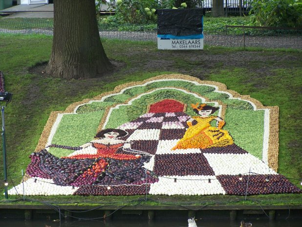 Een fruitmozaïk langs de stadgrachten van Tiel tijdens het jaarlijkse evenemant het Fruitcorso.